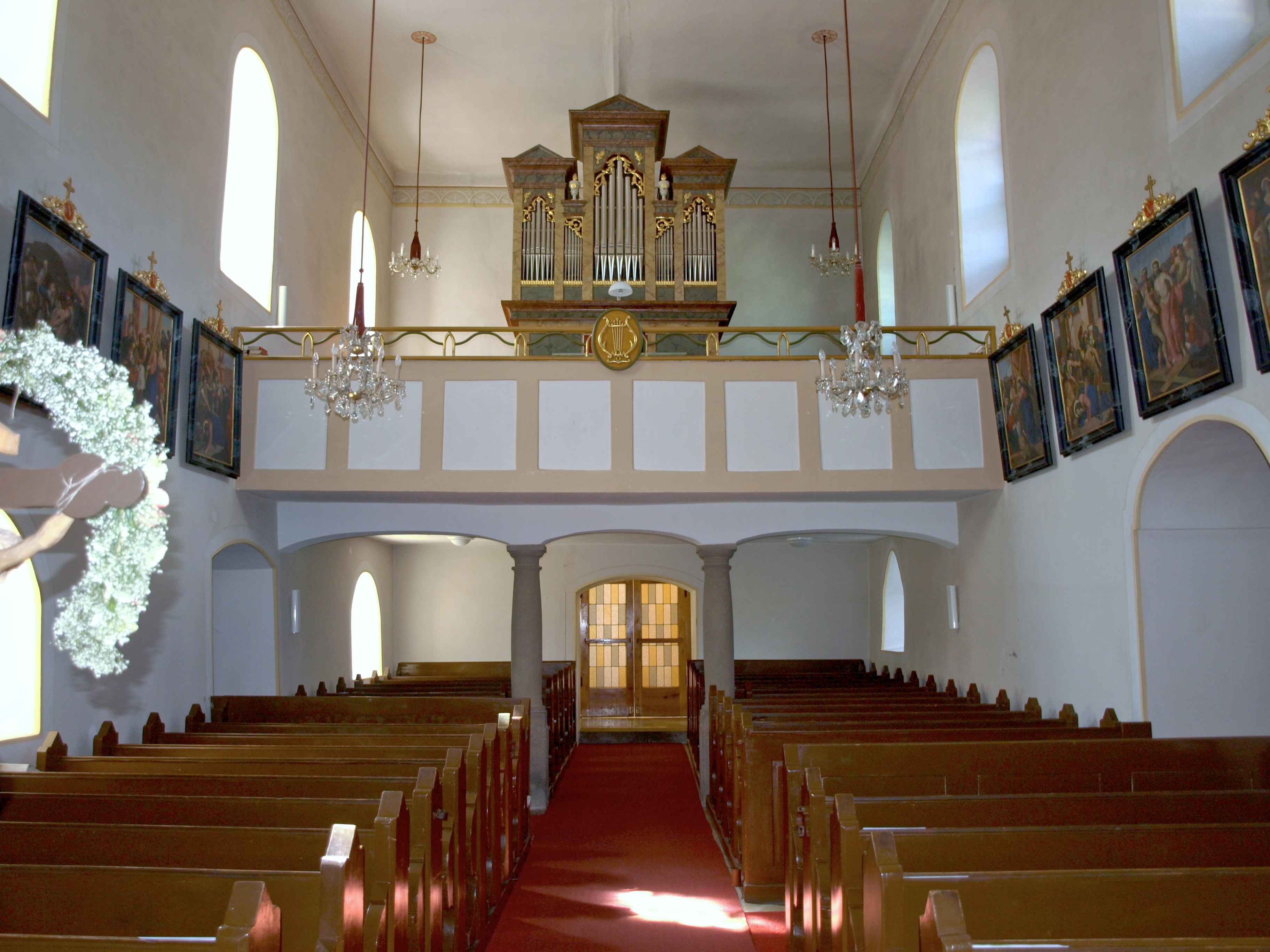 Kath. Pfarrkirche hl. Margarethe und Friedhof